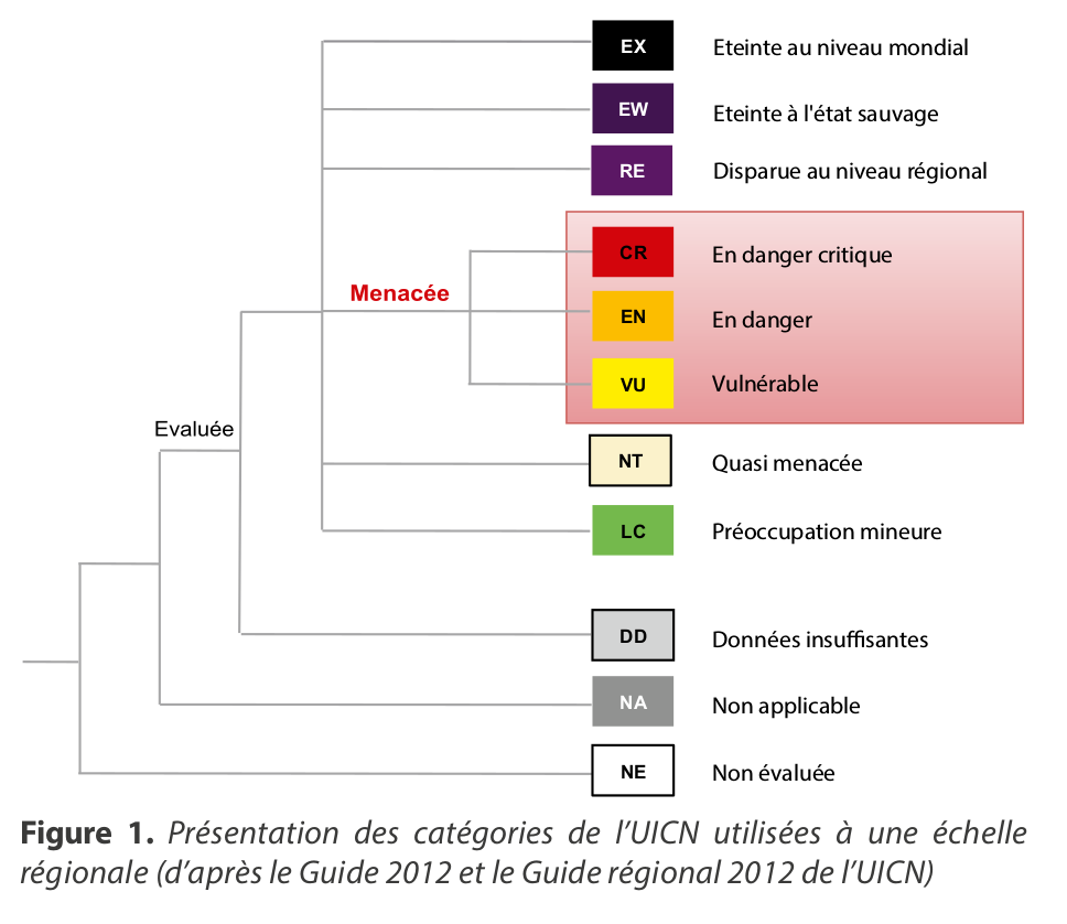 Guide pratique pour la réalisation de Listes rouges régionales des espèces menacées Méthodologie de l’UICN & démarche d’élaboration - Seconde édition Principes généraux de la méthodologie de l’UICN Figure 1. Présentation des catégories de l’UICN utilisées à une échelle régionale (d’après le Guide 2012 et le Guide régional 2012 de l’UICN)